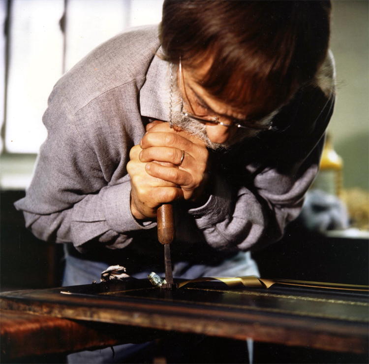 Gainier, Monsieur Bernard ROSENBLUM